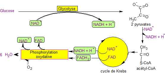 Glycolyse-cycle de Krebs-phosphorylation oxydative